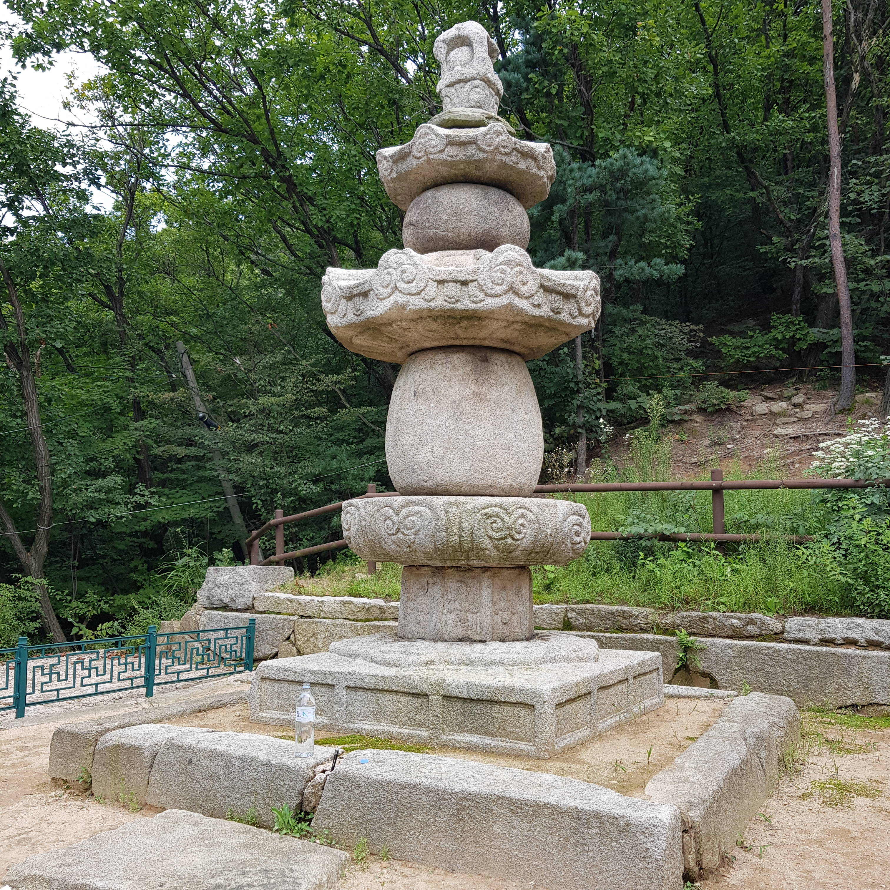 고양 태고사 원증국사탑 (대한민국의 보물 제749호)